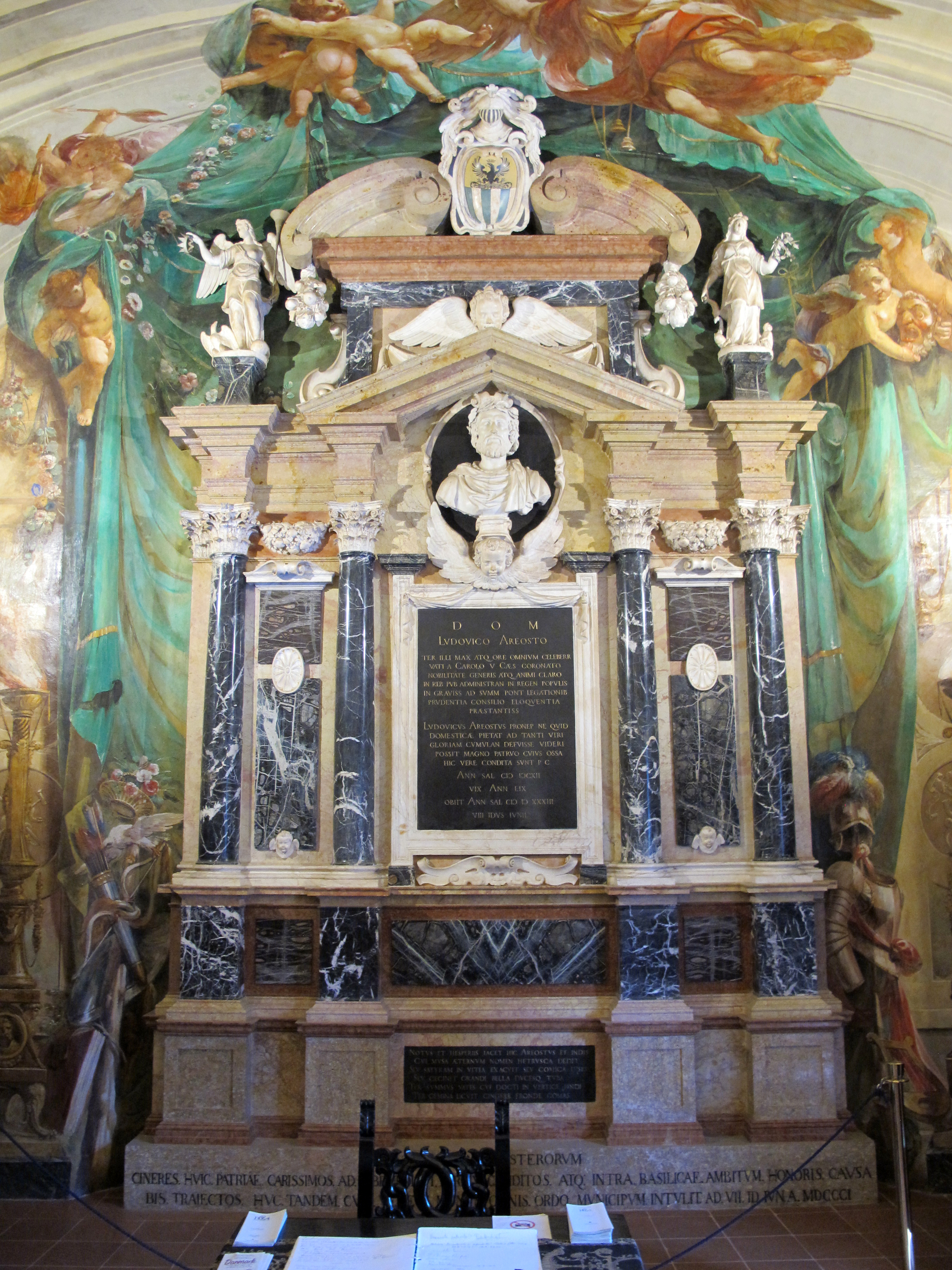 Palazzo Paradiso This is a photo of a monument which is part of cultural heritage of Italy.